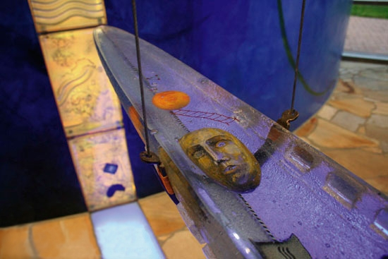 Bertil Vallien "Die Reise", Flamarium Saalkreis GmbH & Co KG, Kabelsketal OT Osmünde